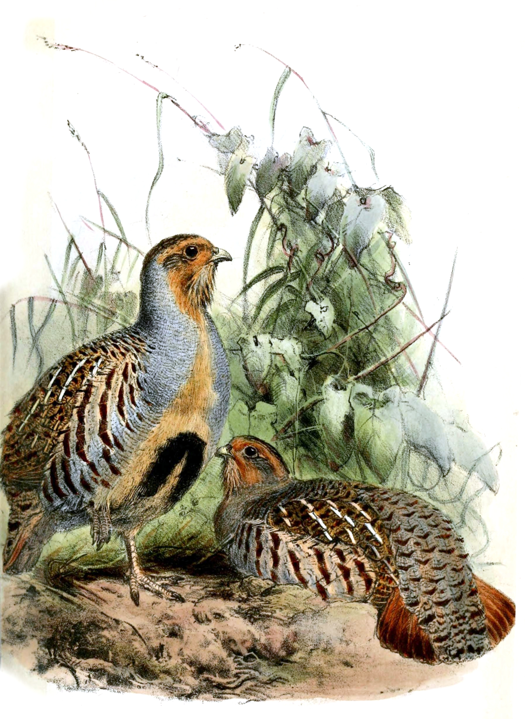 Perdix barbata = P. dauurica